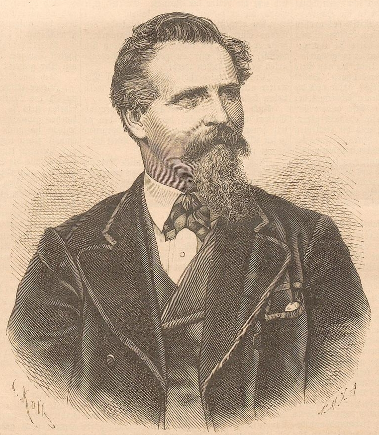 Matthias Schmid. In: Illustriertes Unterhaltungs-Blatt: wöchentliche Beilage zum Darmstädter Tagblatt. Darmstadt, 1891